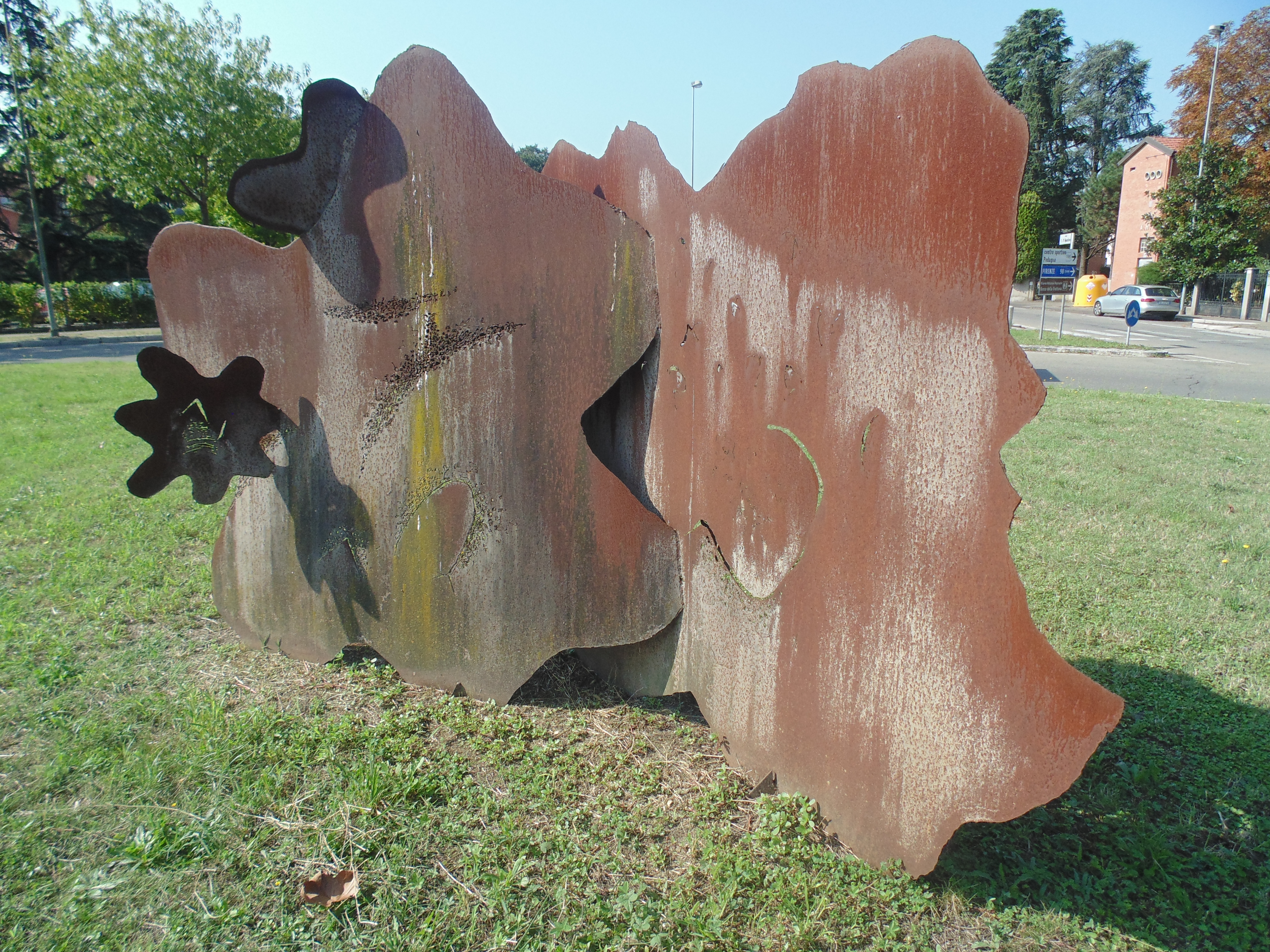 Scultura di Germano Sartelli - MIBAC This is a photo of a monument which is part of cultural heritage of Italy.